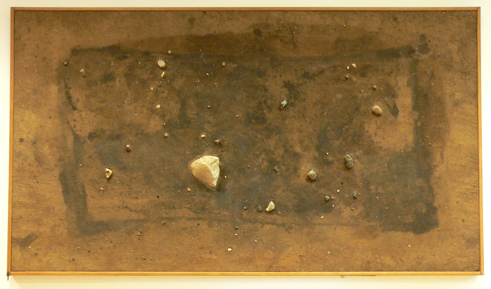 Lackabzug durch Siegfried Flach von einem Grab aus sächsischer Zeit, gefunden im Jahre 2000 bei der Ausgrabung der Siedlungskammer Rullstorf, vermutlich Adelsgrab oder Kriegergrab. Der 2,8 x 1,8 Meter große Lackabzug ist ausgestellt im Vortragssaal des Niedersächsischen Landesamtes für Denkmalpflege in Hannover